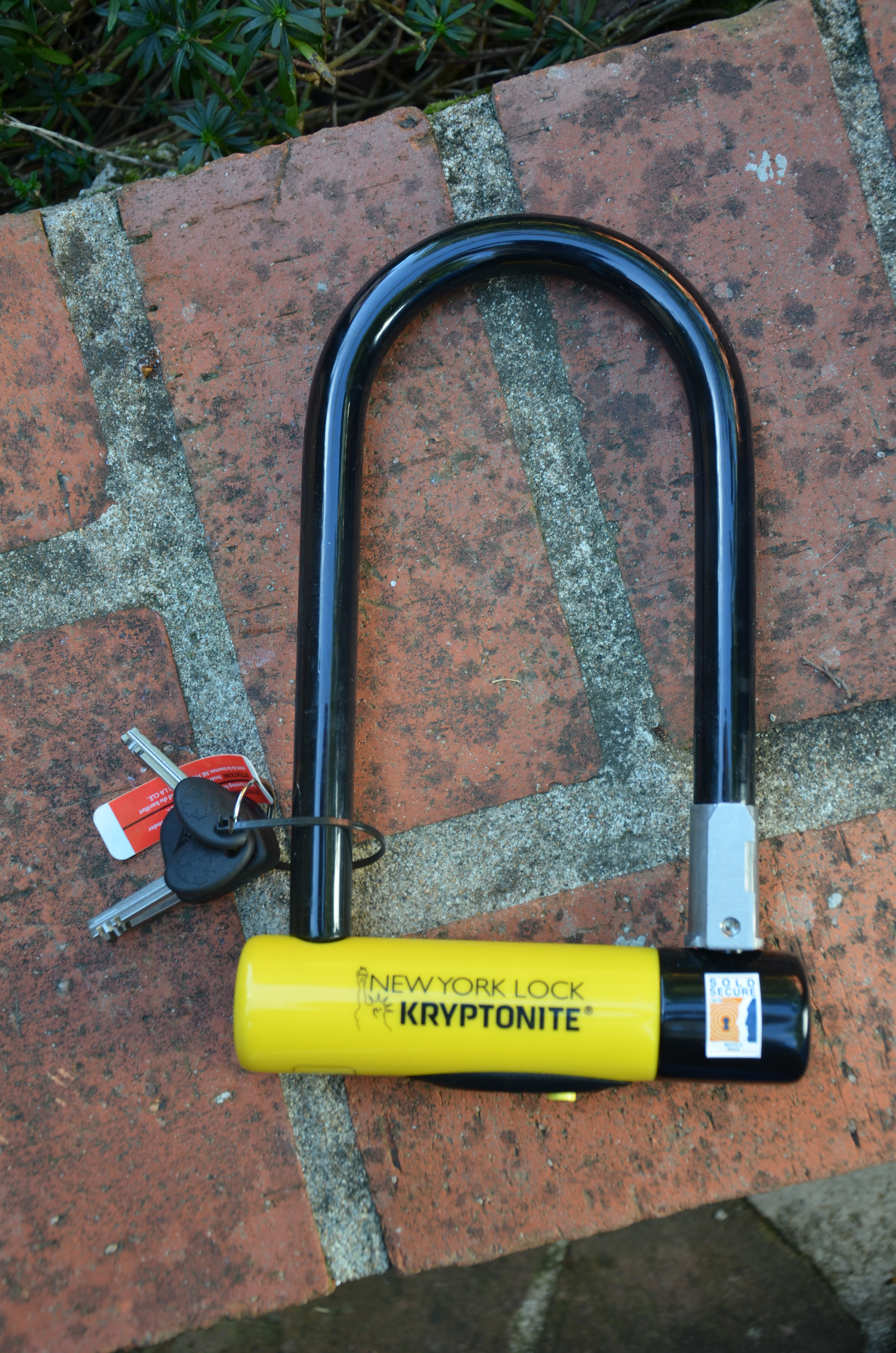 Antivol de vélo de marque Kryptonite, modèle New York standard.